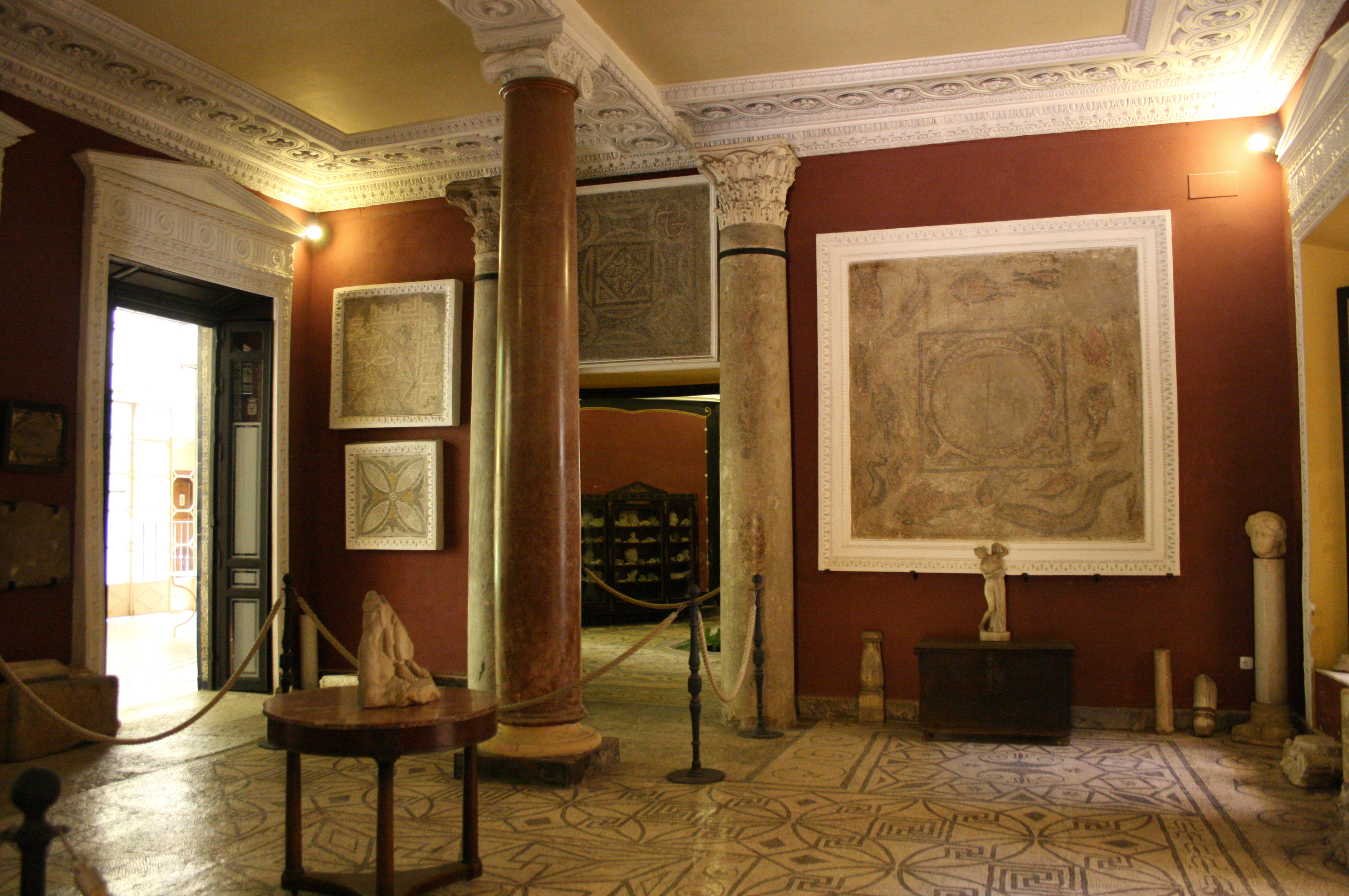 Palacio de la Condesa de Lebrija, Calle Cuna 8, Séville, Espagne